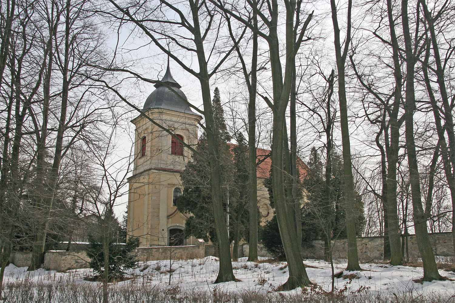 Vysoké Chvojno - barokní kostel Sv. Gotharda